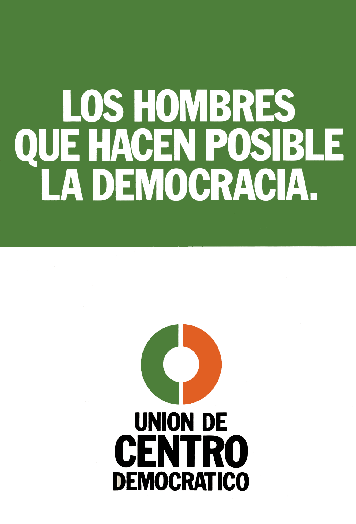 Cartel de Unión de Centro Democrático para las elecciones de 1977